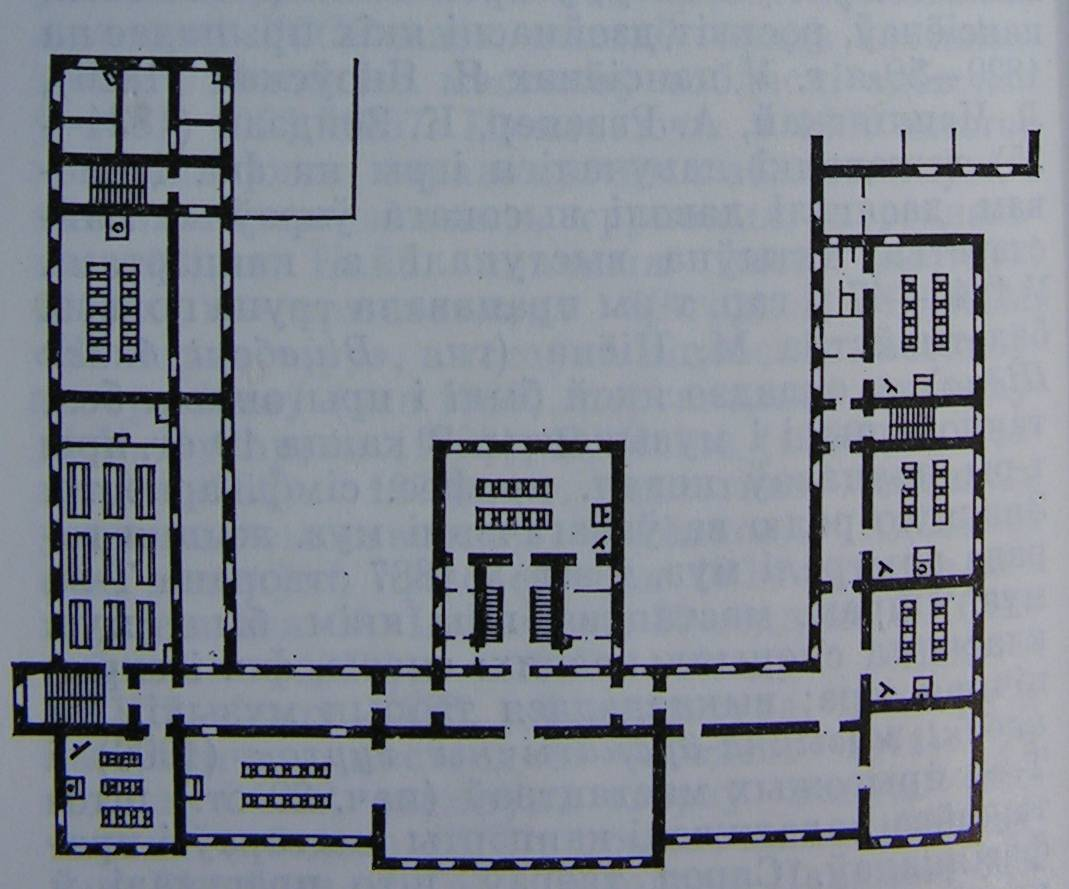 Полацкае жаночае духоўнае вучылішча. План 2 паверха